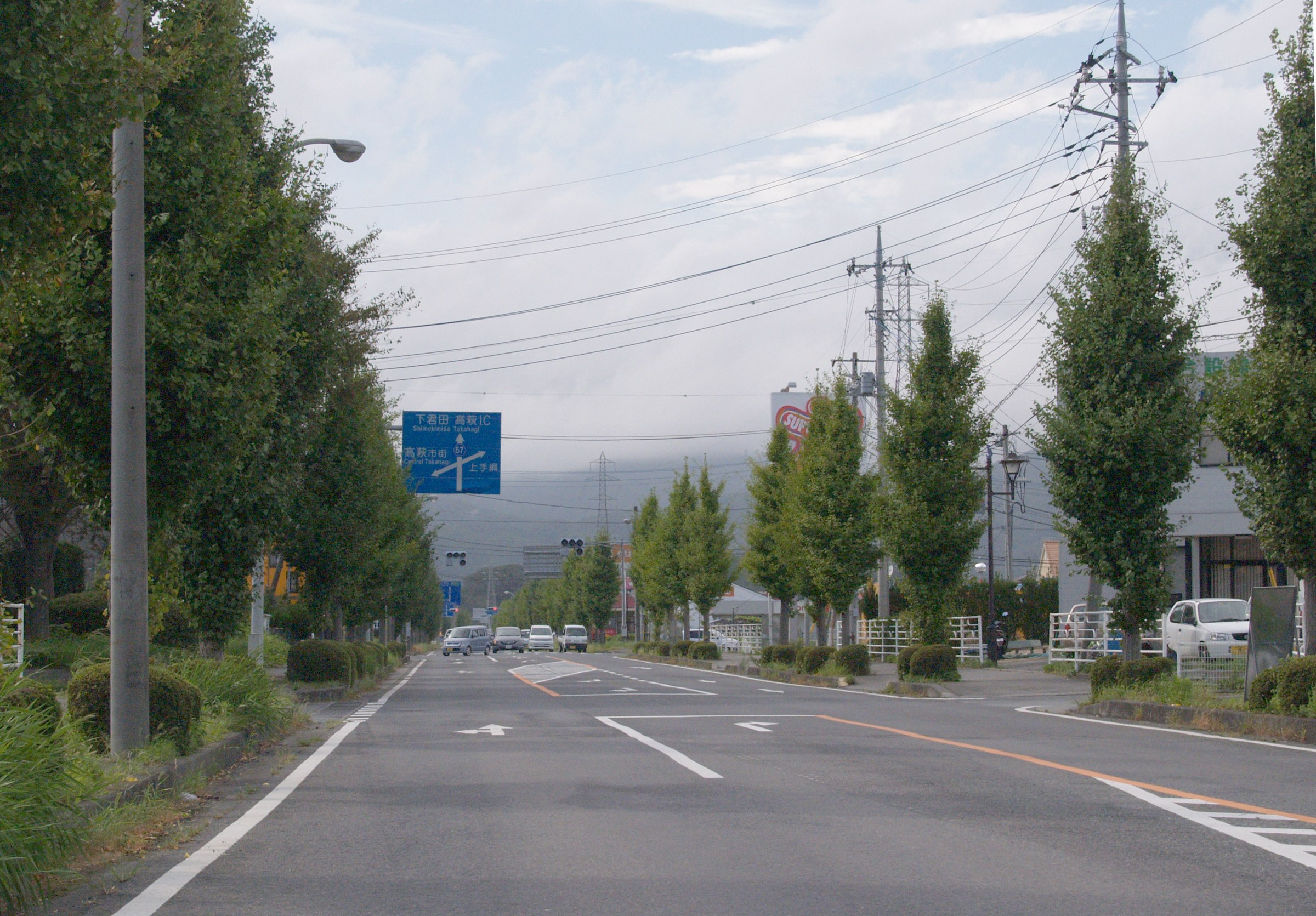 茨城県道67号高萩インター線